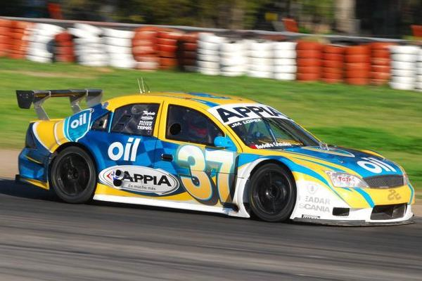 Ford Mondeo II de Top Race V6. Piloto: José María López